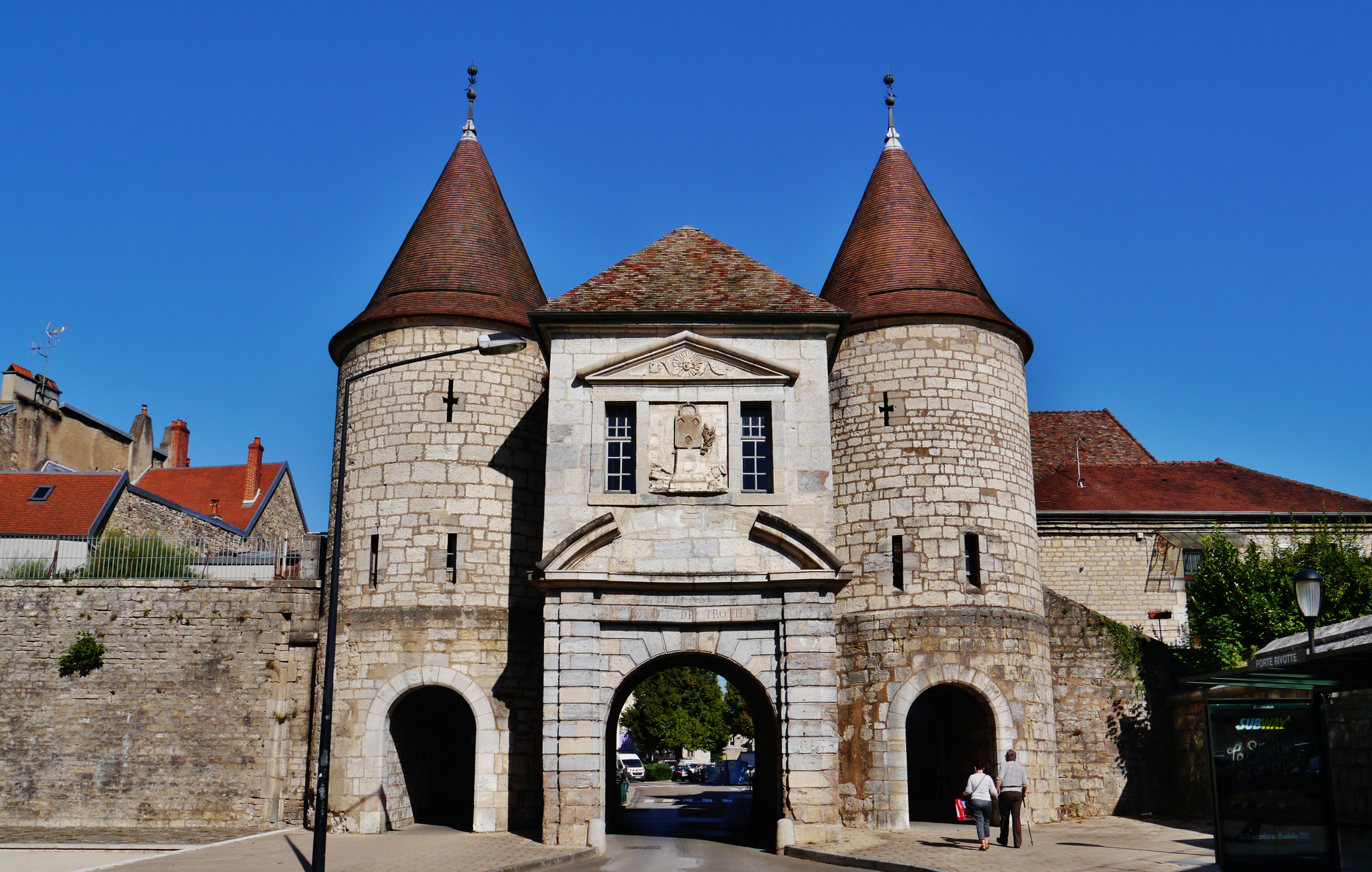 Rivotte-Tor, Besancon, Département Doubs, Region Frache-Comté (heute Burgund-Franche-Comté), Frankreich